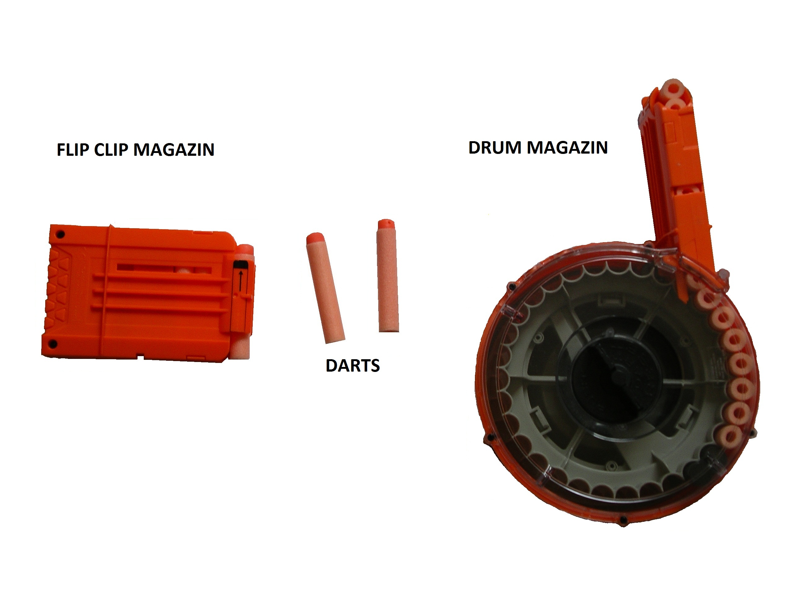 Links: Kleines 6-Schuss Magazin; Mitte: 2 Darts; Rechts: Großes 35er Trommelmagazin